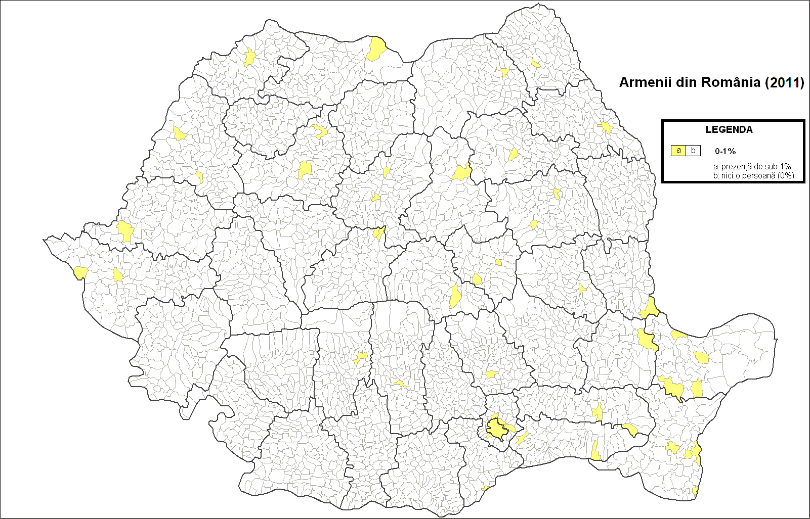 Distribuția armenilor pe unitățile administrativ-teritoriale din România (2011). Realizat după File:Armenii din Romania (2002).png.